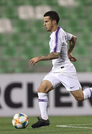 Sebastian Giovinco durante la partita tra Al-Hilal ed Engheran